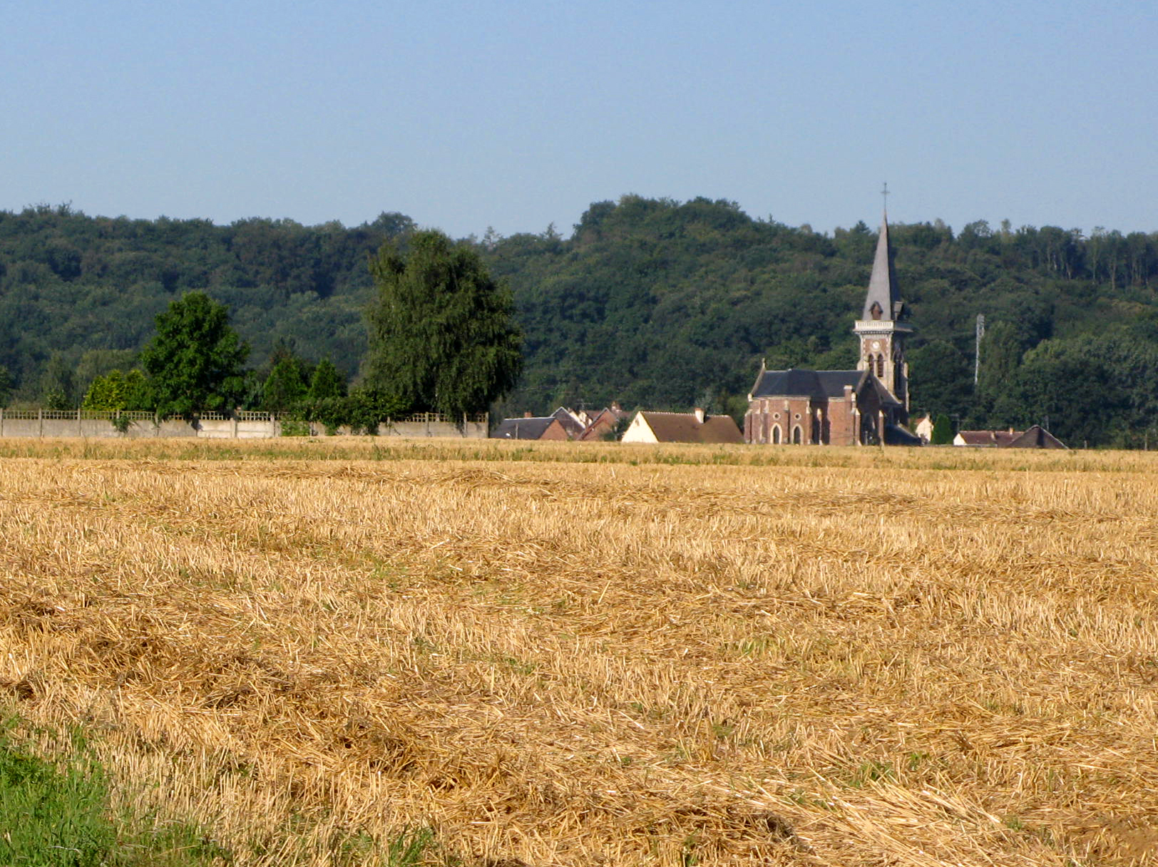 Porquéricourt (Oise, France) - Le village vu depuis la route allant de Roye à Noyon. .